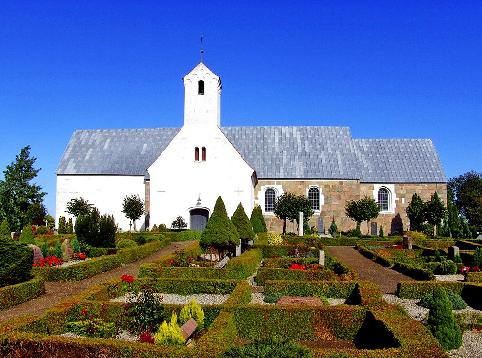 fra syd